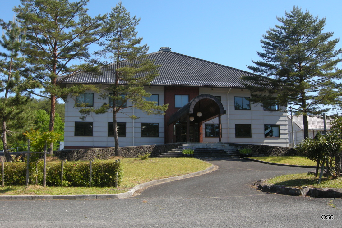 広島県の北広島町芸北支所